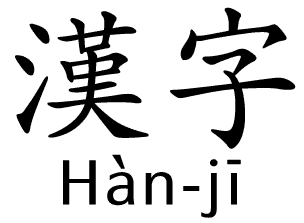 「漢字」二字及閩南語的白話字對應。